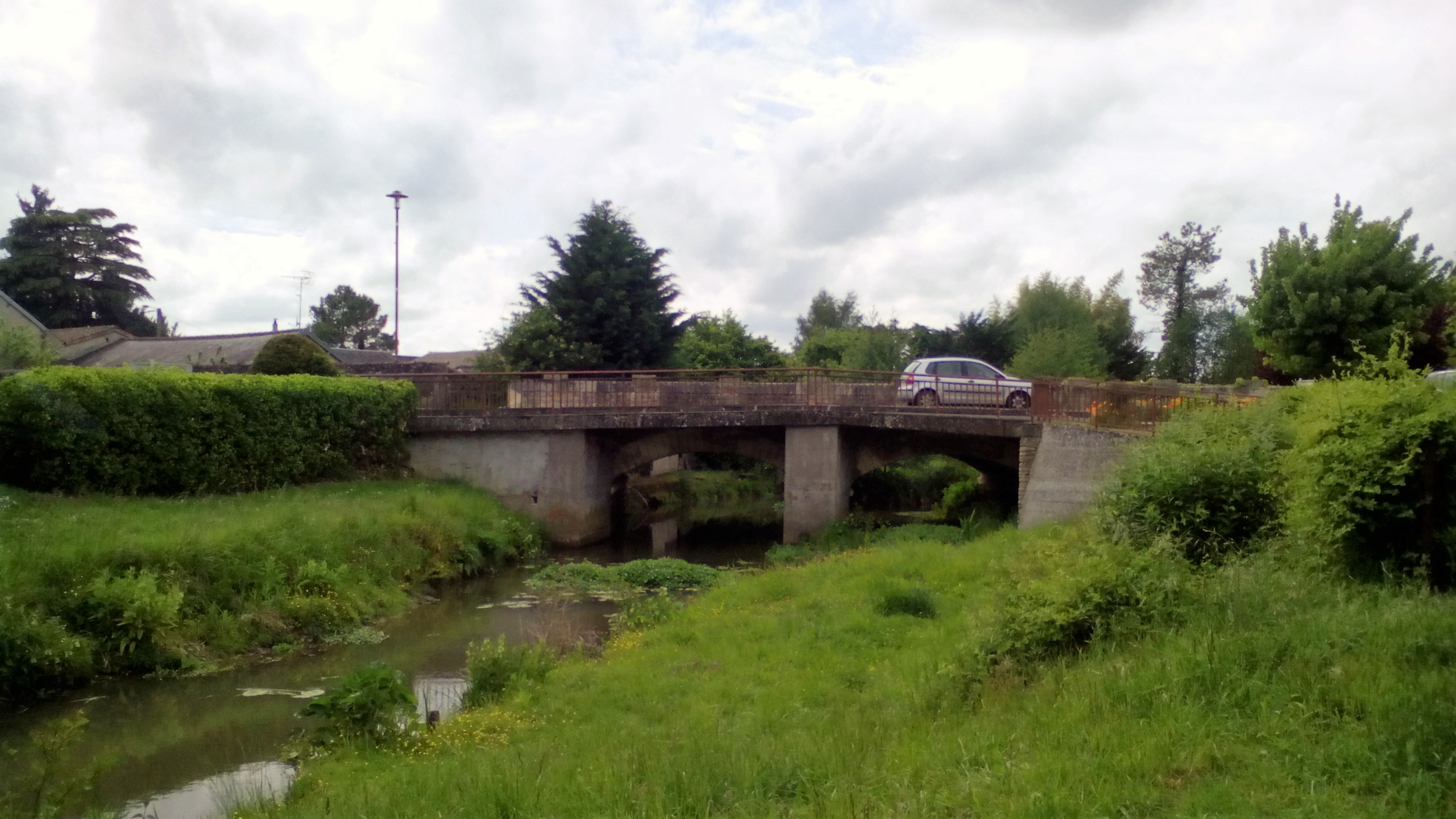 Le pont de l'Envigne à Lencloître (86140, France)